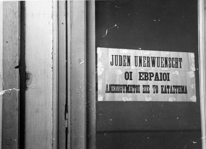 Griechenland, Saloniki, antijüdisches Plakat Zentralbild II. Weltkrieg 1939-1945; Auch im besetzten Griechenland wurden die berüchtigten nazistischen Judengesetze von den Faschisten durchgeführt. Plakat in Saloniki. Mai 1941 [Scherl / Atlantik] [Griechenland, Thessaloniki.- Schild an Tür "Juden unerwünscht. Οι Εβραίοι ανεπιθύμητοι εις το κατάστημα"]